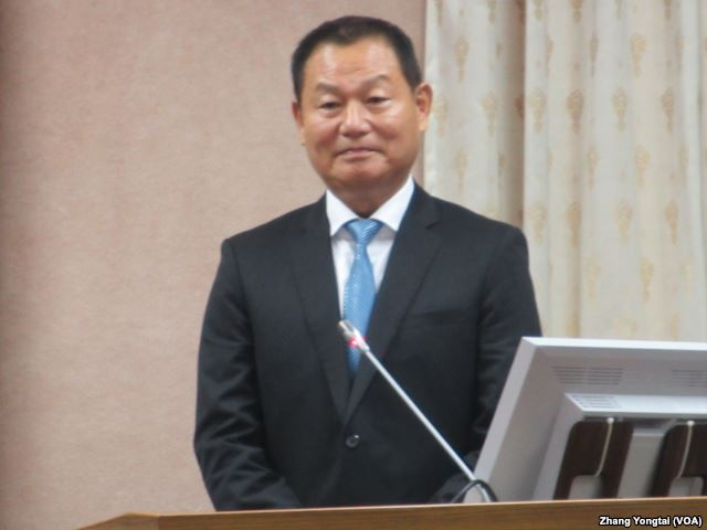 中文（台灣）: 時任中華民國國家安全局局長的李翔宙